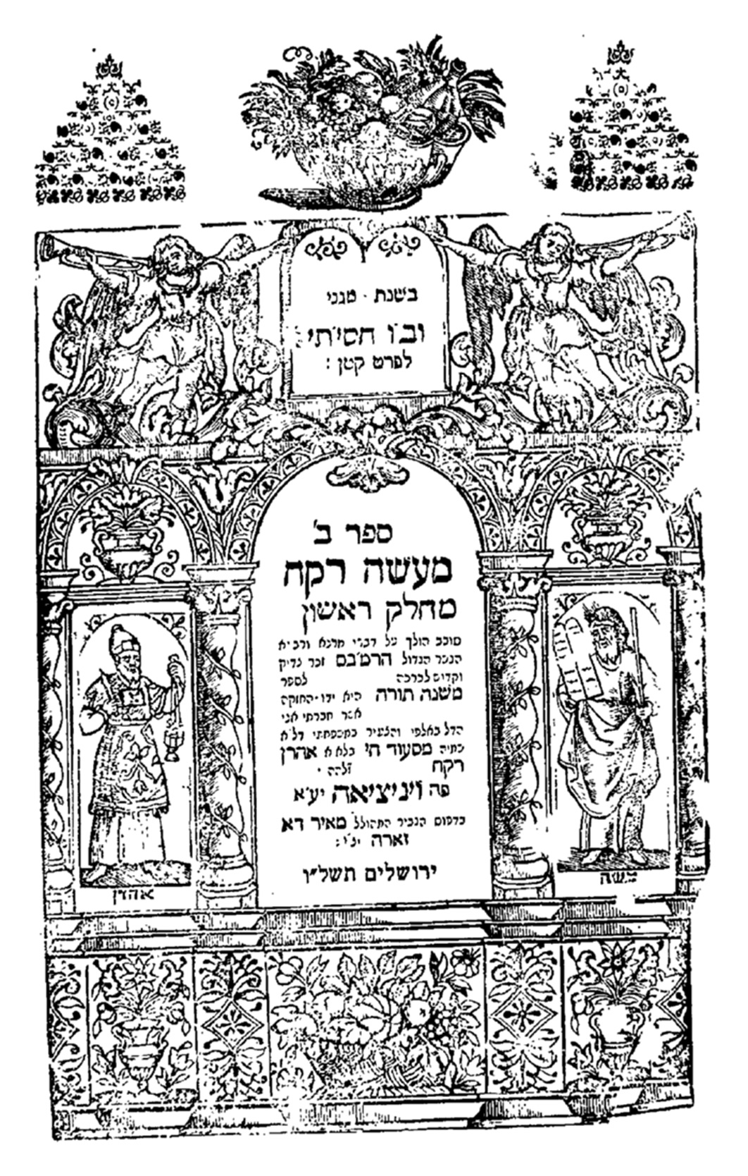 ספר מעשה רקח